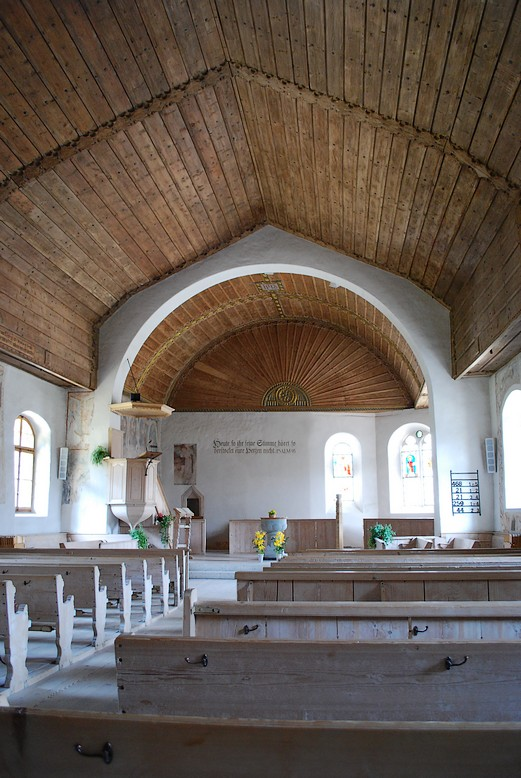 Vue de la nef de l'église de Zweisimmen (canton de Berne, Suisse)